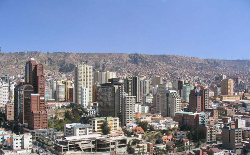 Panoramica de La Paz - Bolivia